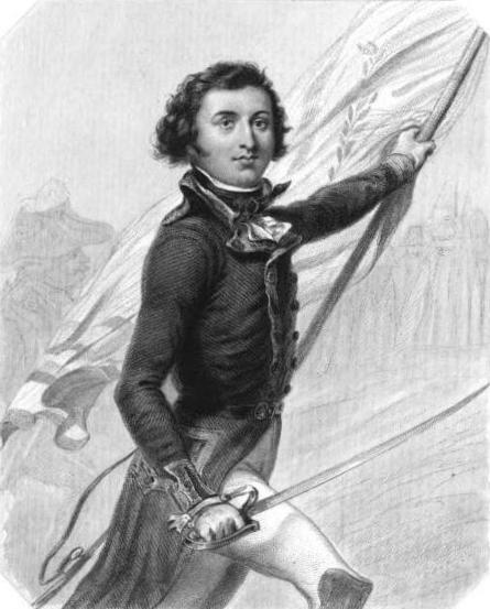 Le Duc de Chartres